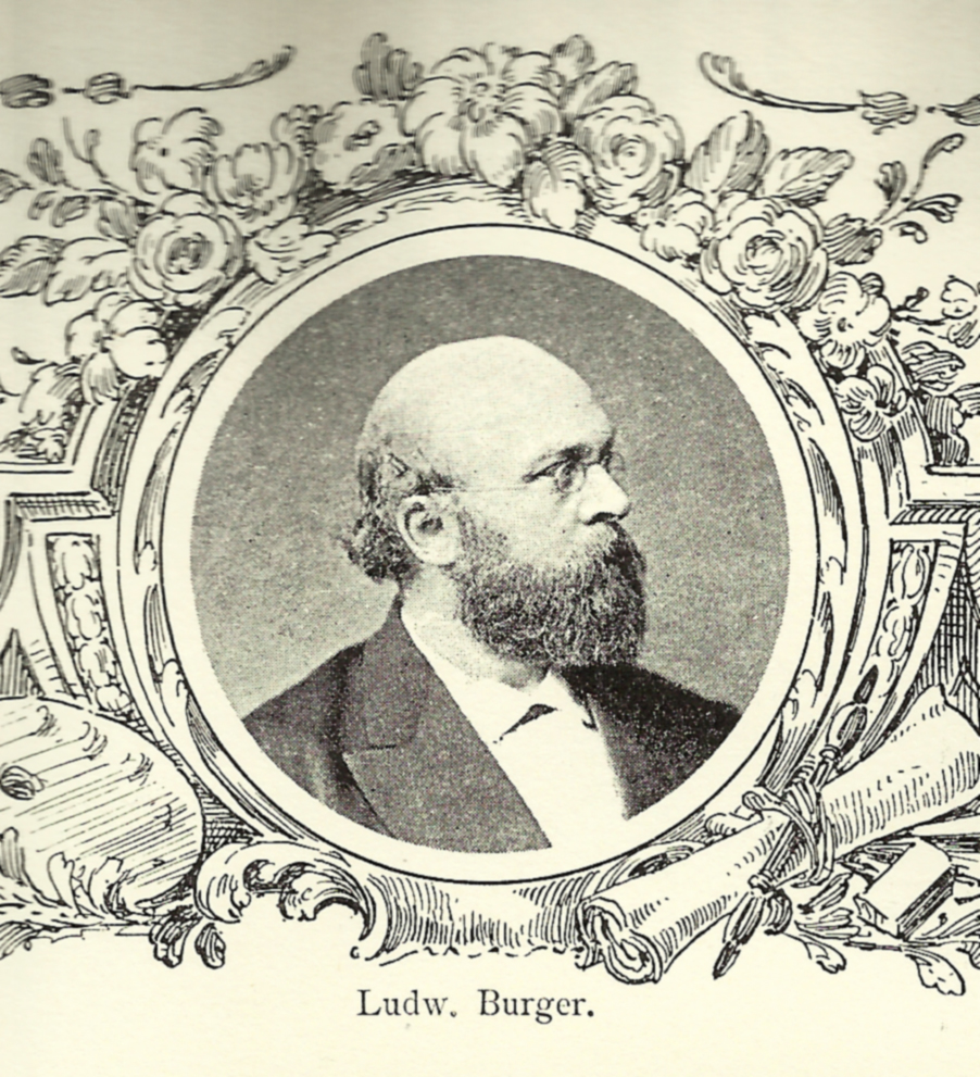 Porträt Ludwig Burger